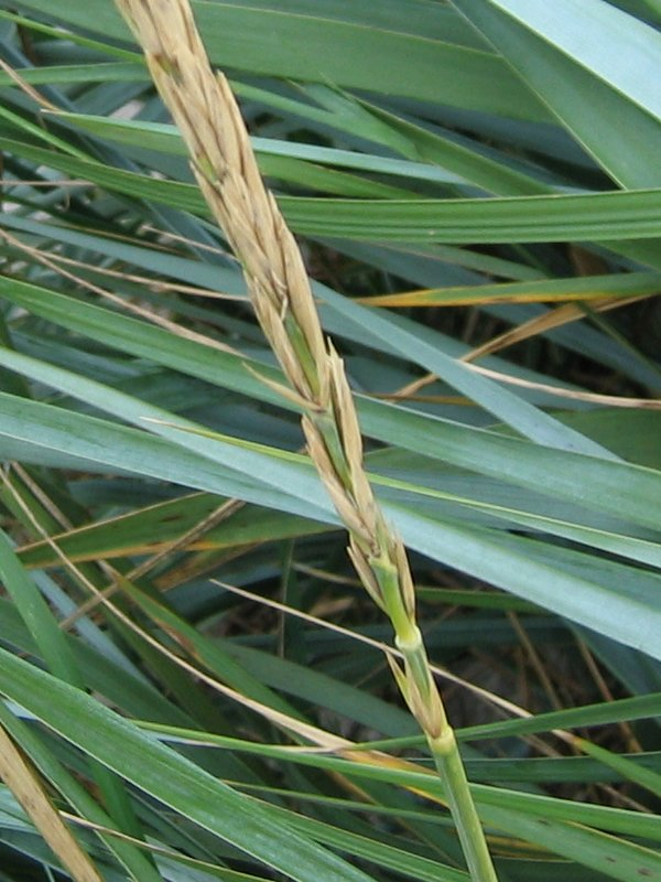 Strandroggen Leymus arenarius, Detail der Ährenrispe